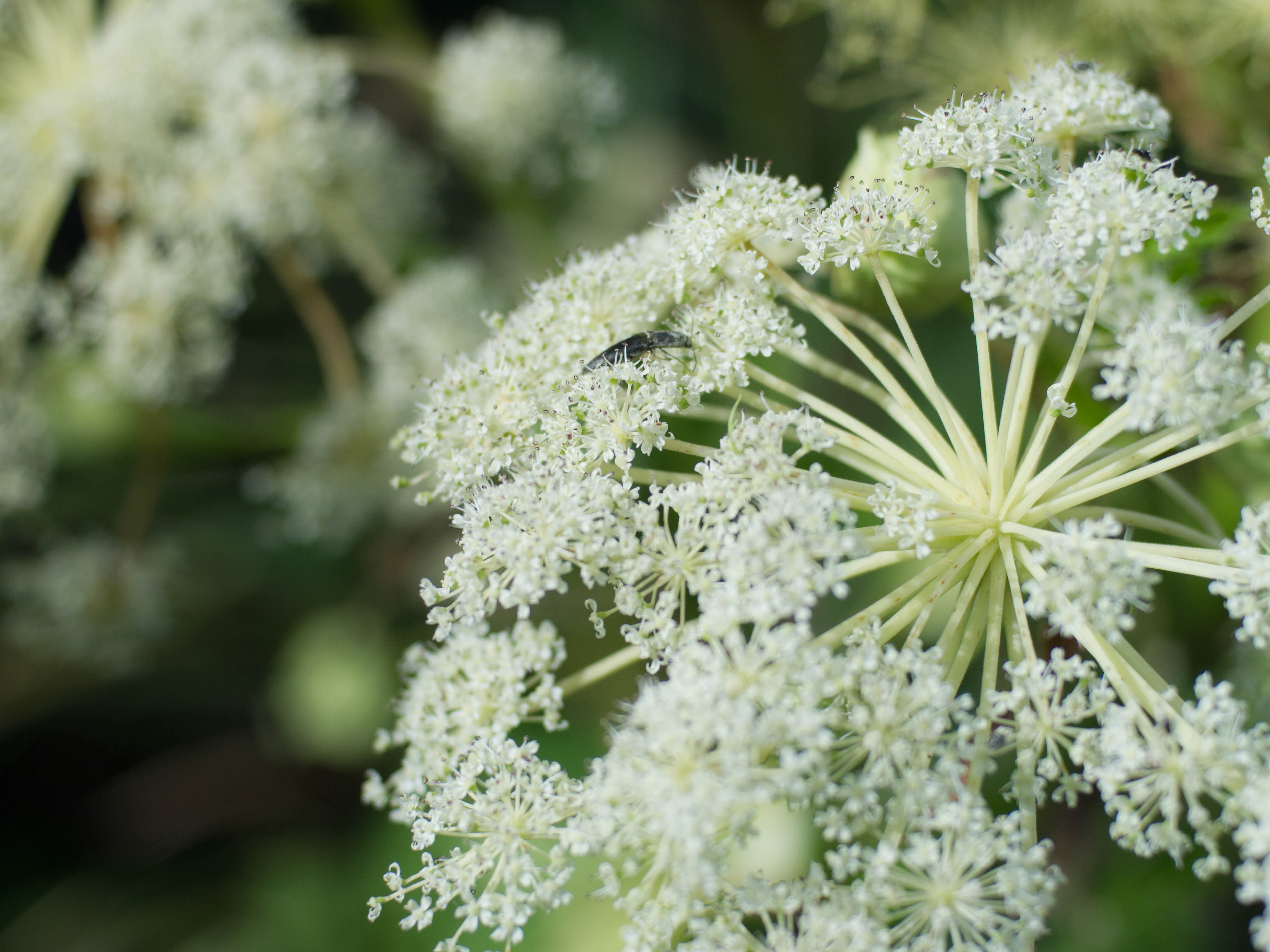 Angelica dahurica.jpg